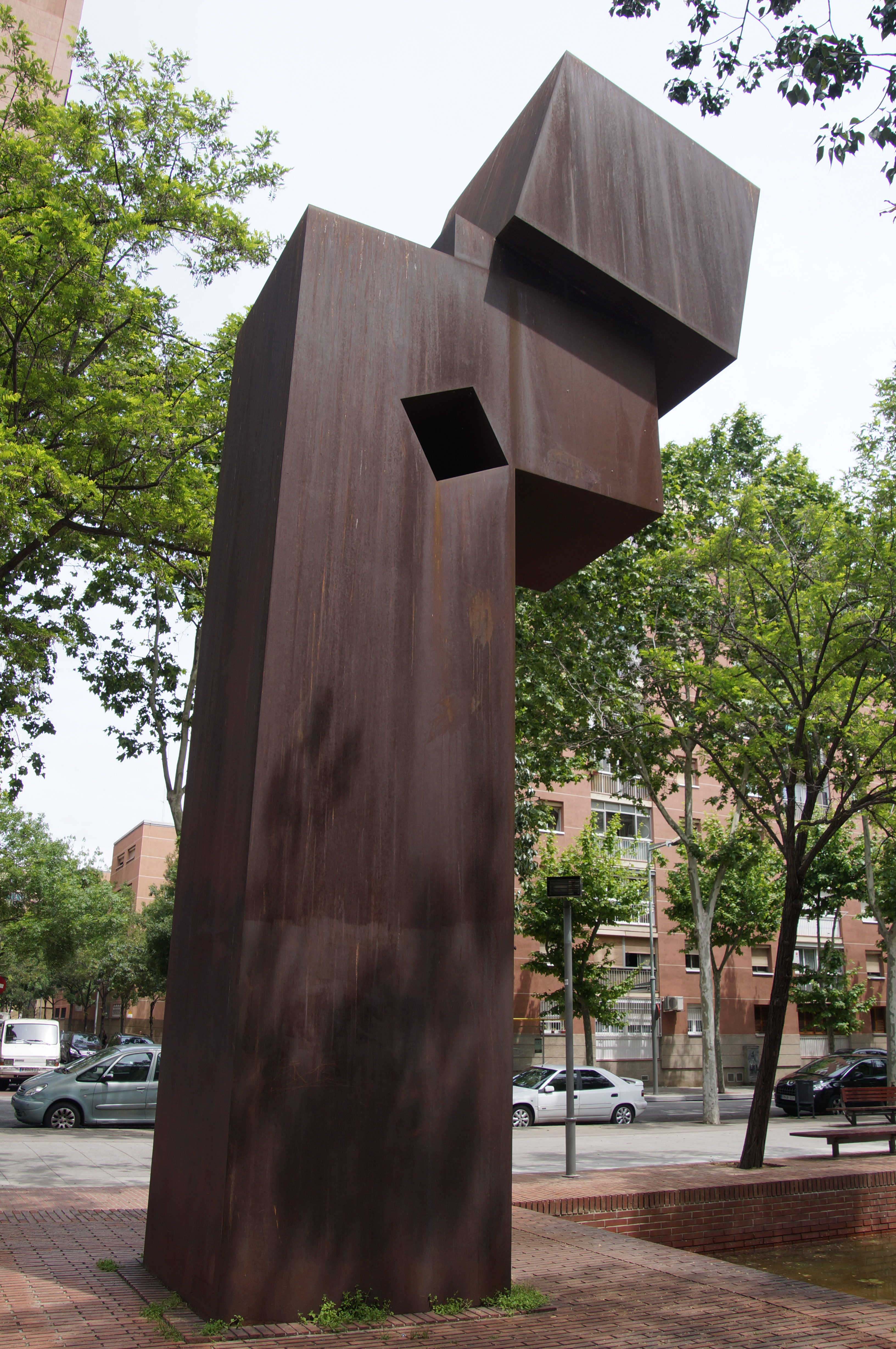 El llarg viatge (Francesc Torres Monsó). Rambla Prim amb Rambla Guipúscoa (Barcelona)